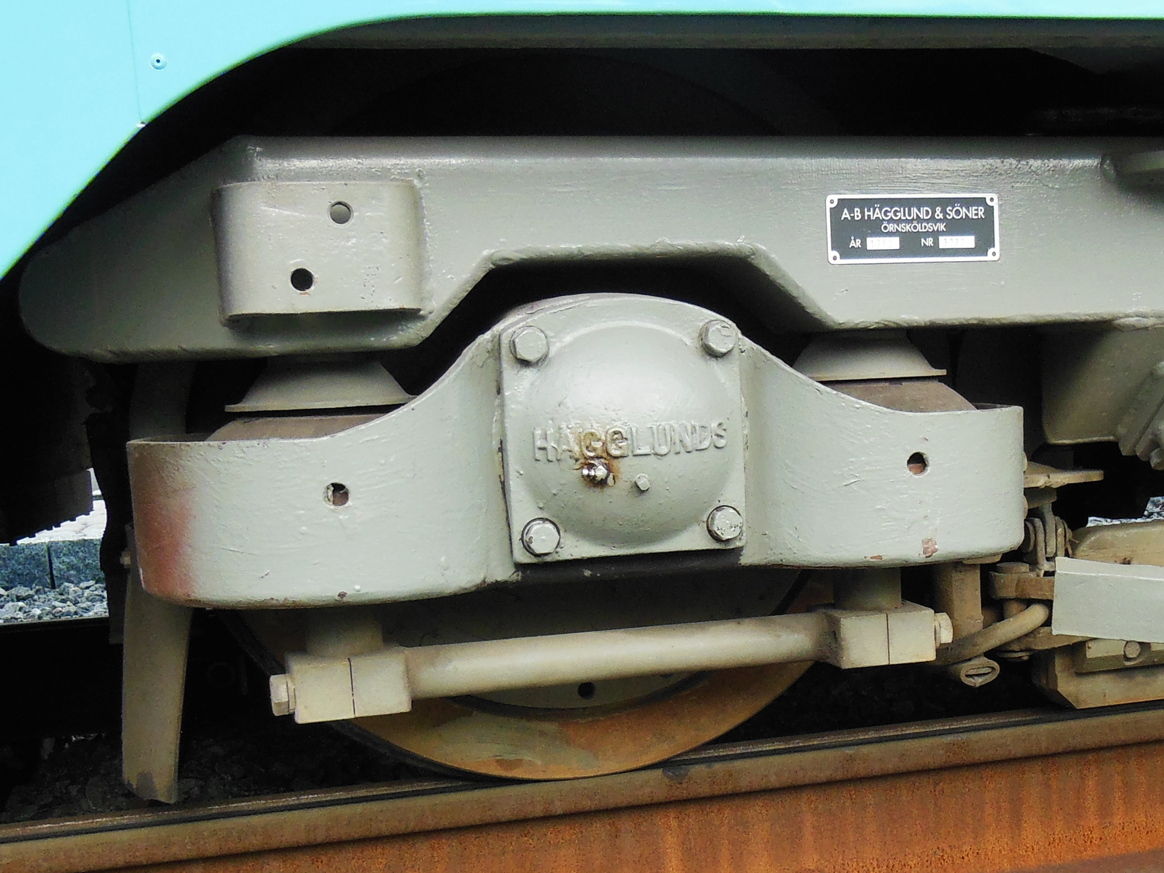 M25-spårvagn nummer 606 i Nymånegatans vändslinga, Göteborg.